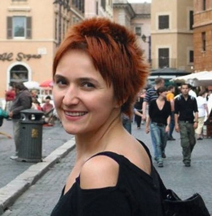 ხათუნა ცხადაძე, 2013